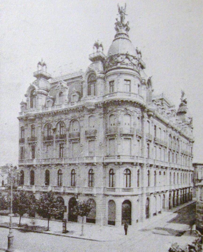 Edificio del Hotel Metropole como se vio entre 1899 y 1909. Avenida de Mayo, esquina Salta.